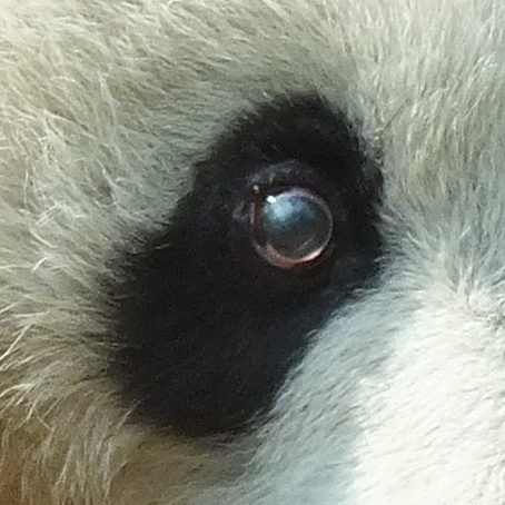 中文（中国大陆）: 大熊貓(眼睛)